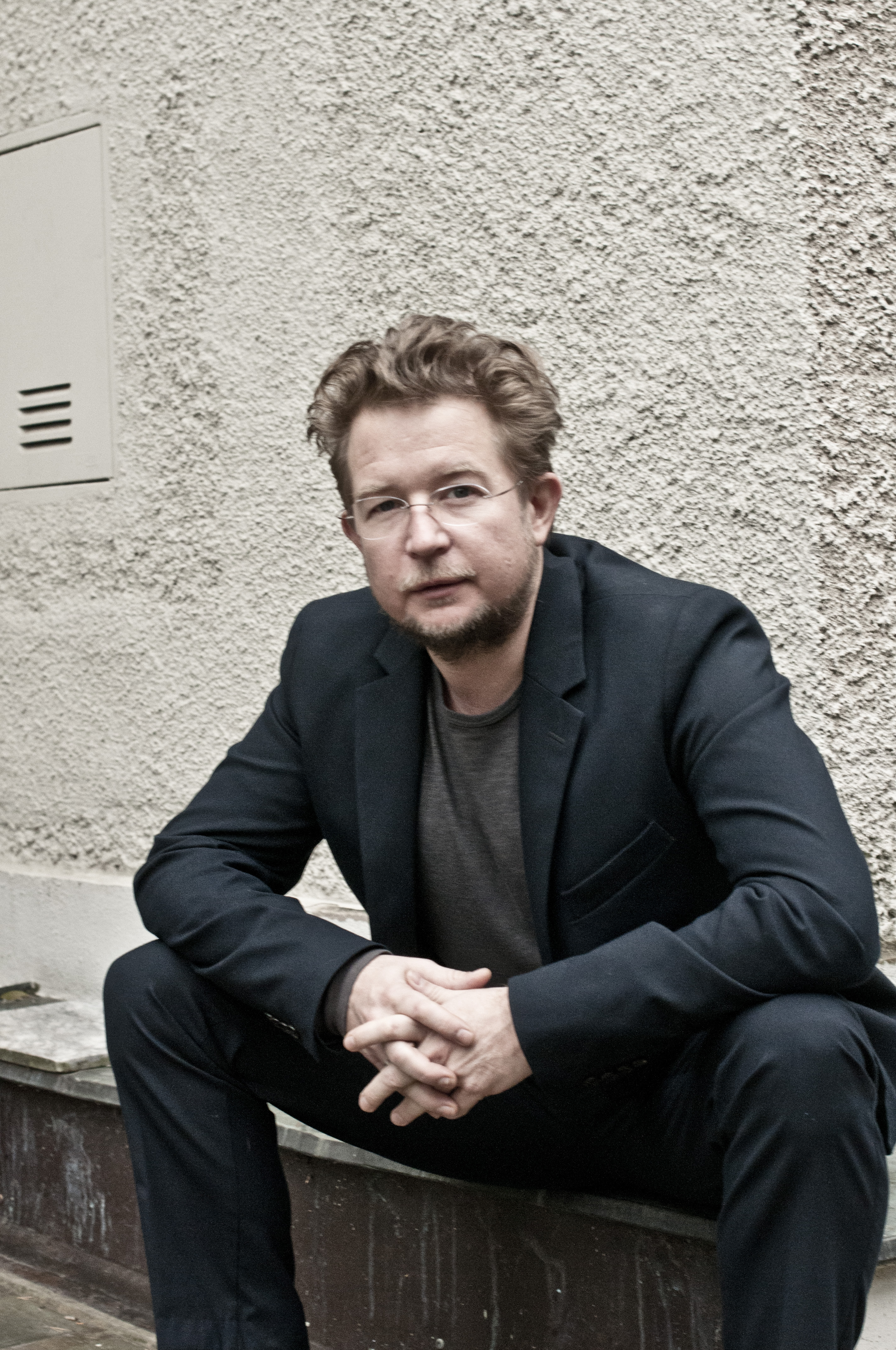 Pressefoto Zeno Stanek